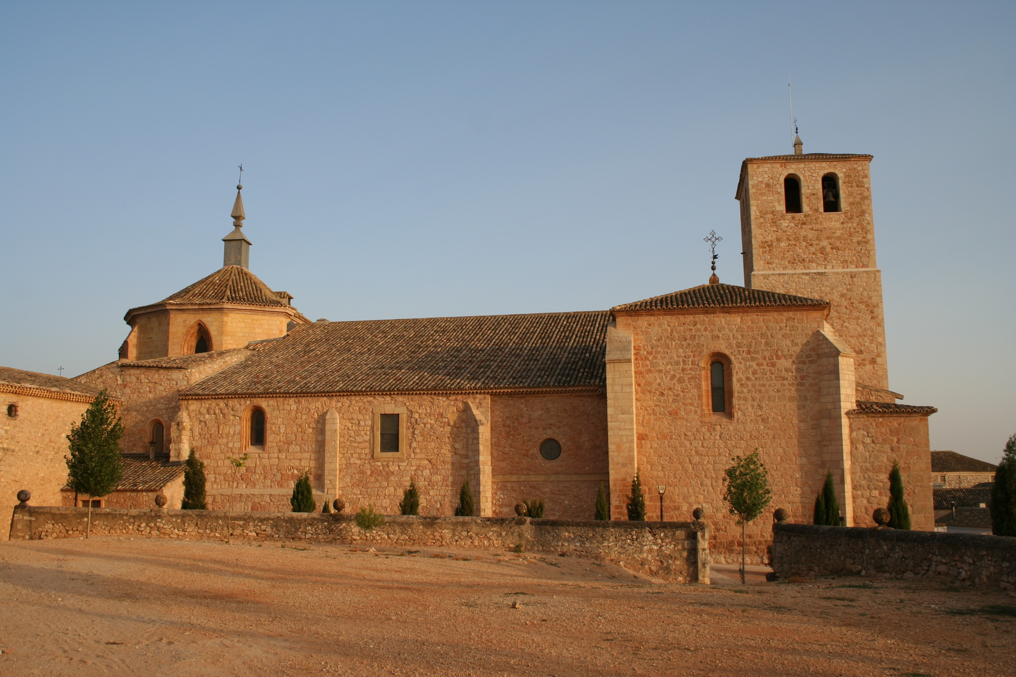 Vista general de La Colegiata